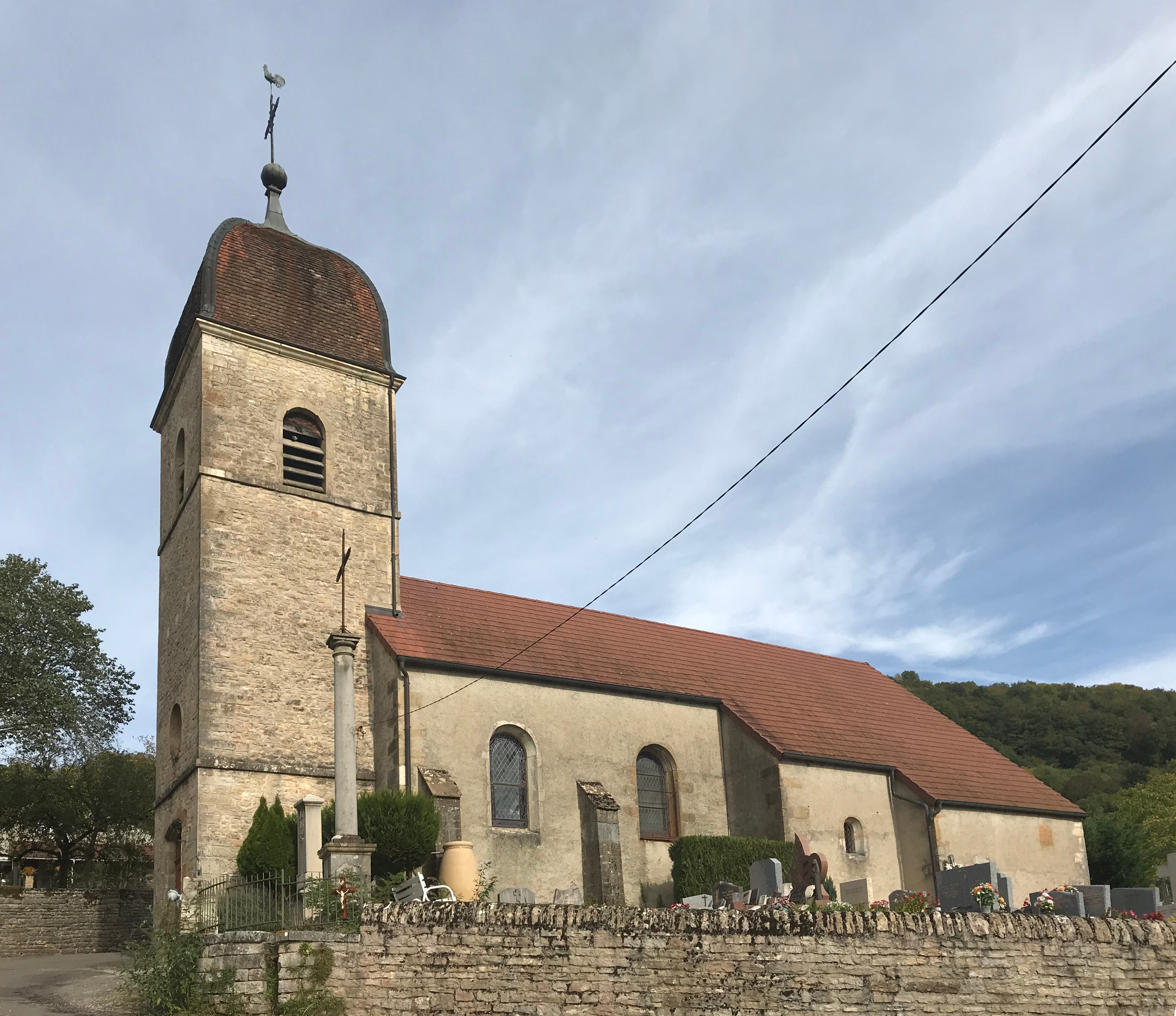 Image du village de Montagna-le-Reconduit, département du Jura, France, en octobre 2017.